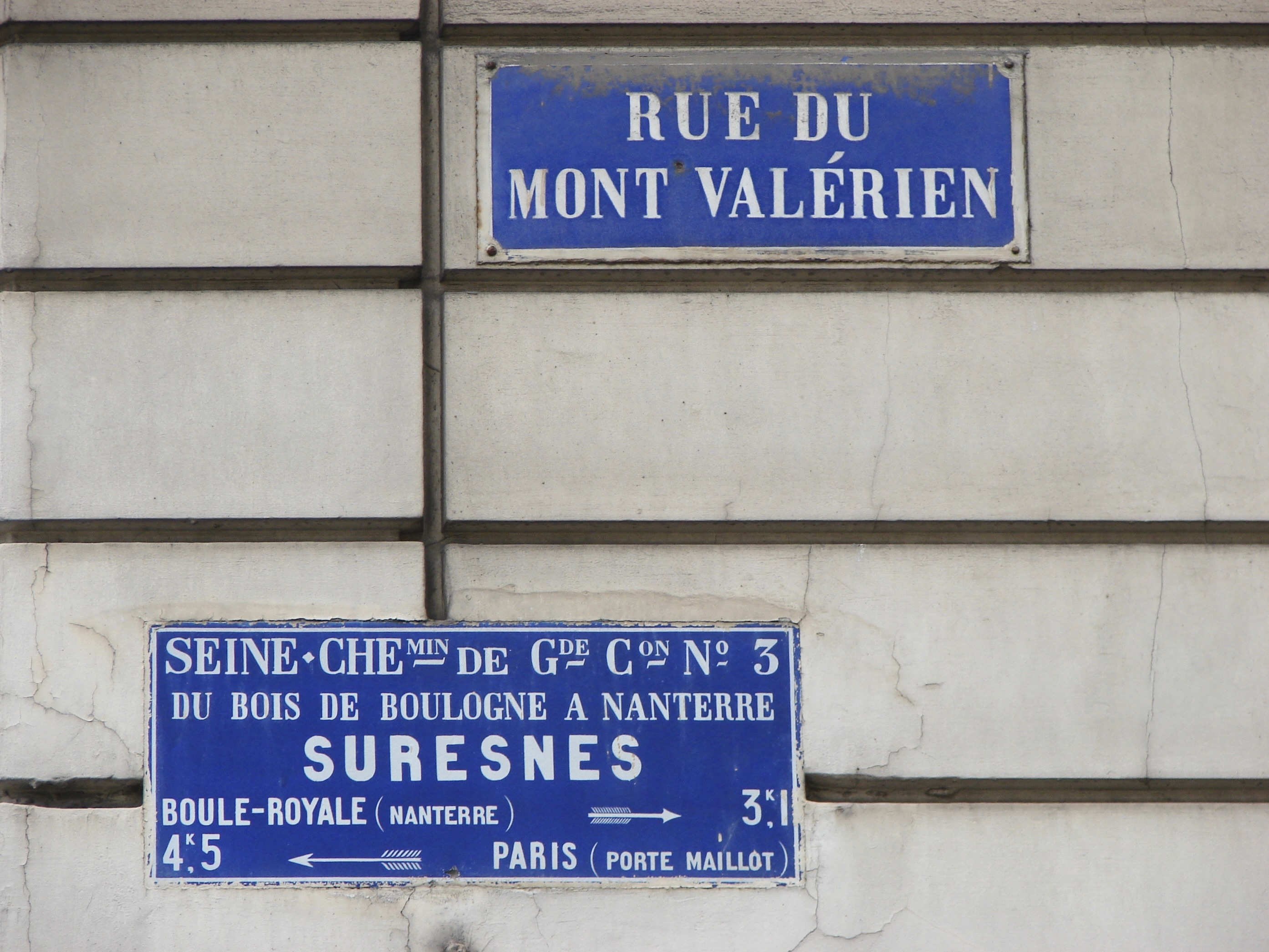 Plaque de la rue du Mont Valerien a Suresnes